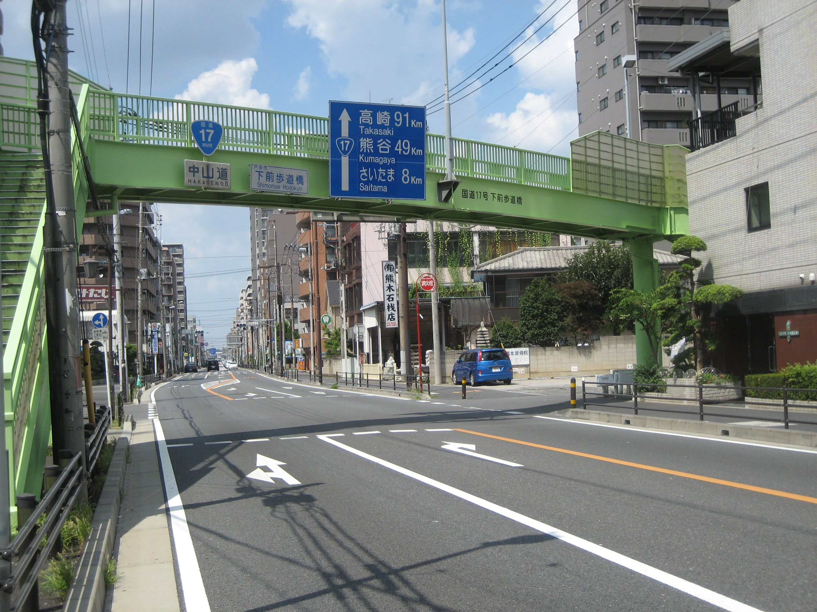 国道17号線埼玉県戸田市下前歩道橋付近